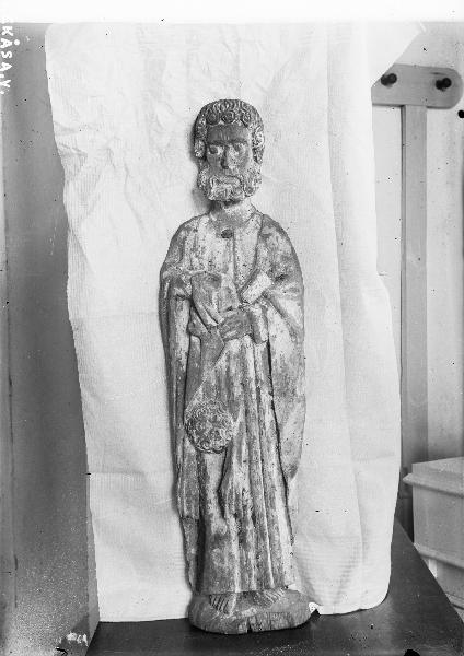 Träskulptur från altarskåp, S:t Bartolomeus, slutet av 1400-talet. Snabbinv. Kategori: (05) Altarprydnader, detaljerTräskulptur från altarskåp, S:t Bartolomeus, slutet av 1400-talet. Snabbinv.